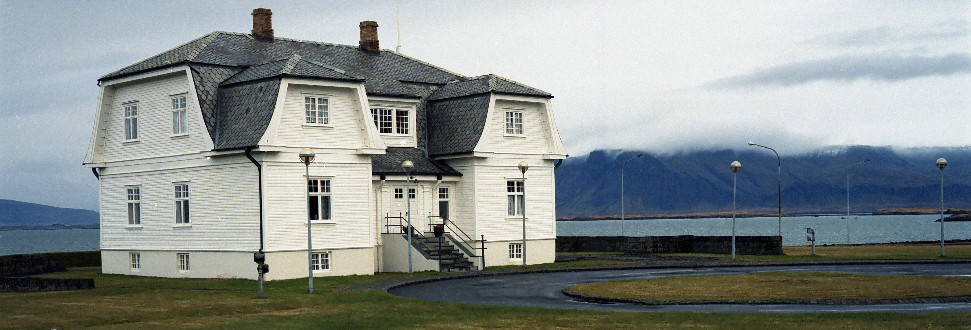 hofdi house in reykjavik, iceland